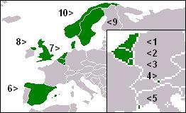 eigen werk op kaart europa